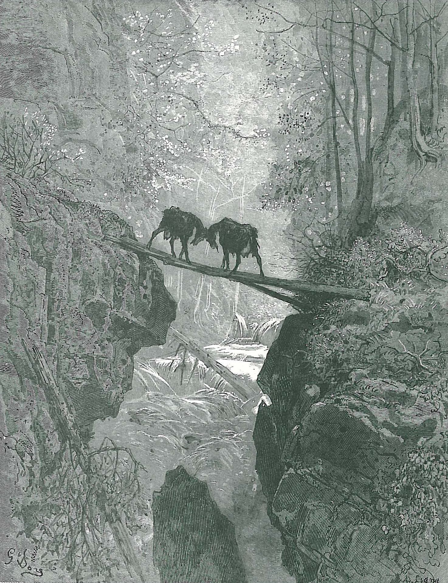 illustration for Jean de La Fontaine's fables by Gustave Doré